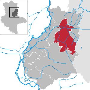 Genthin im Landkreis Jerichower Land, Sachsen-Anhalt